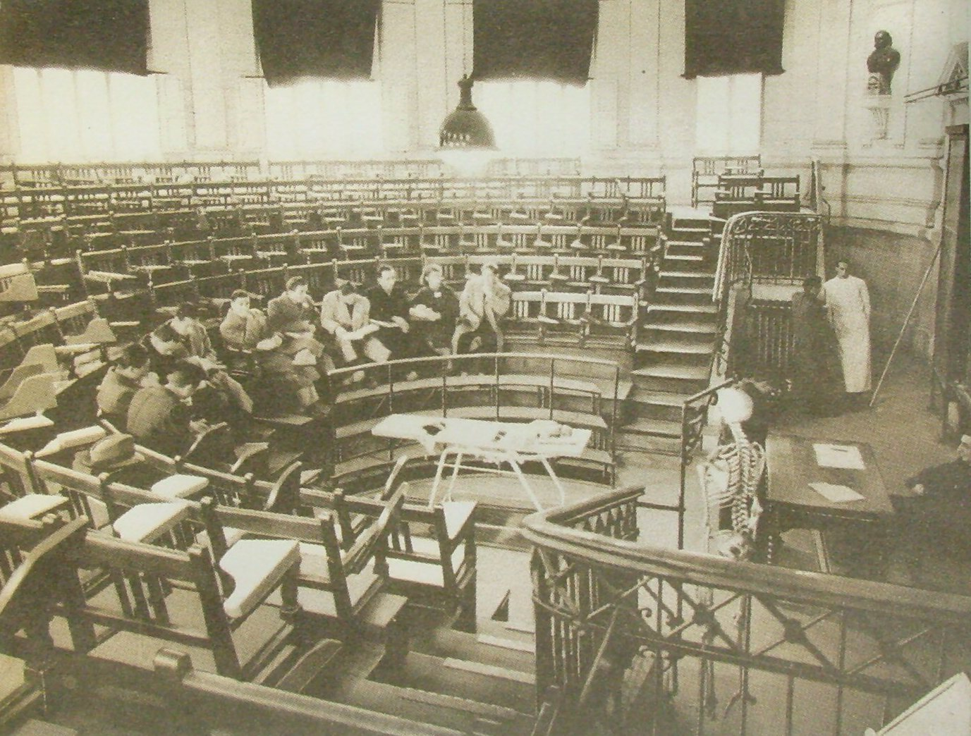 Anfiteatro